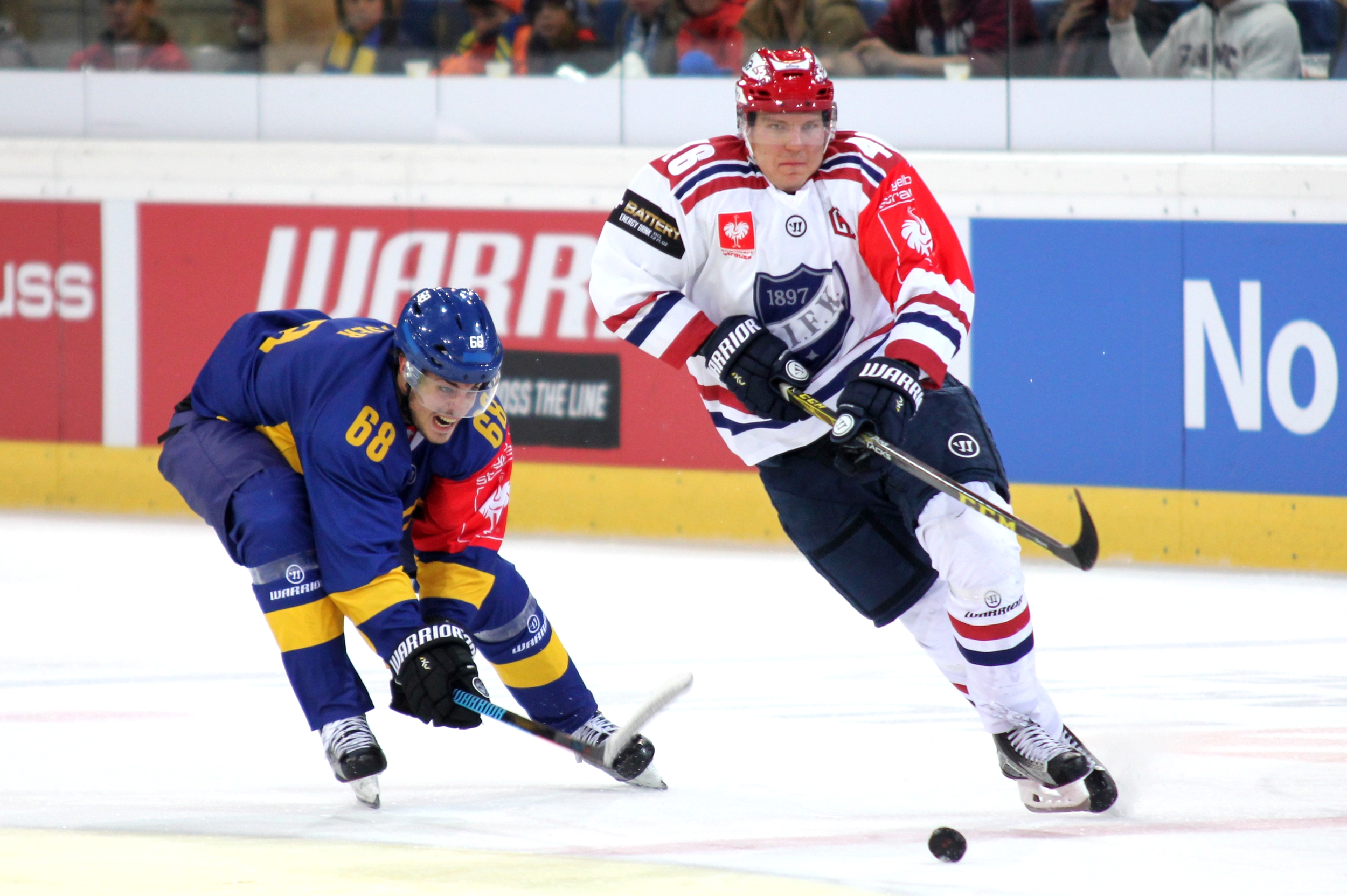 Sven Ryser (D 68), Teemu Ramstedt (H 46).